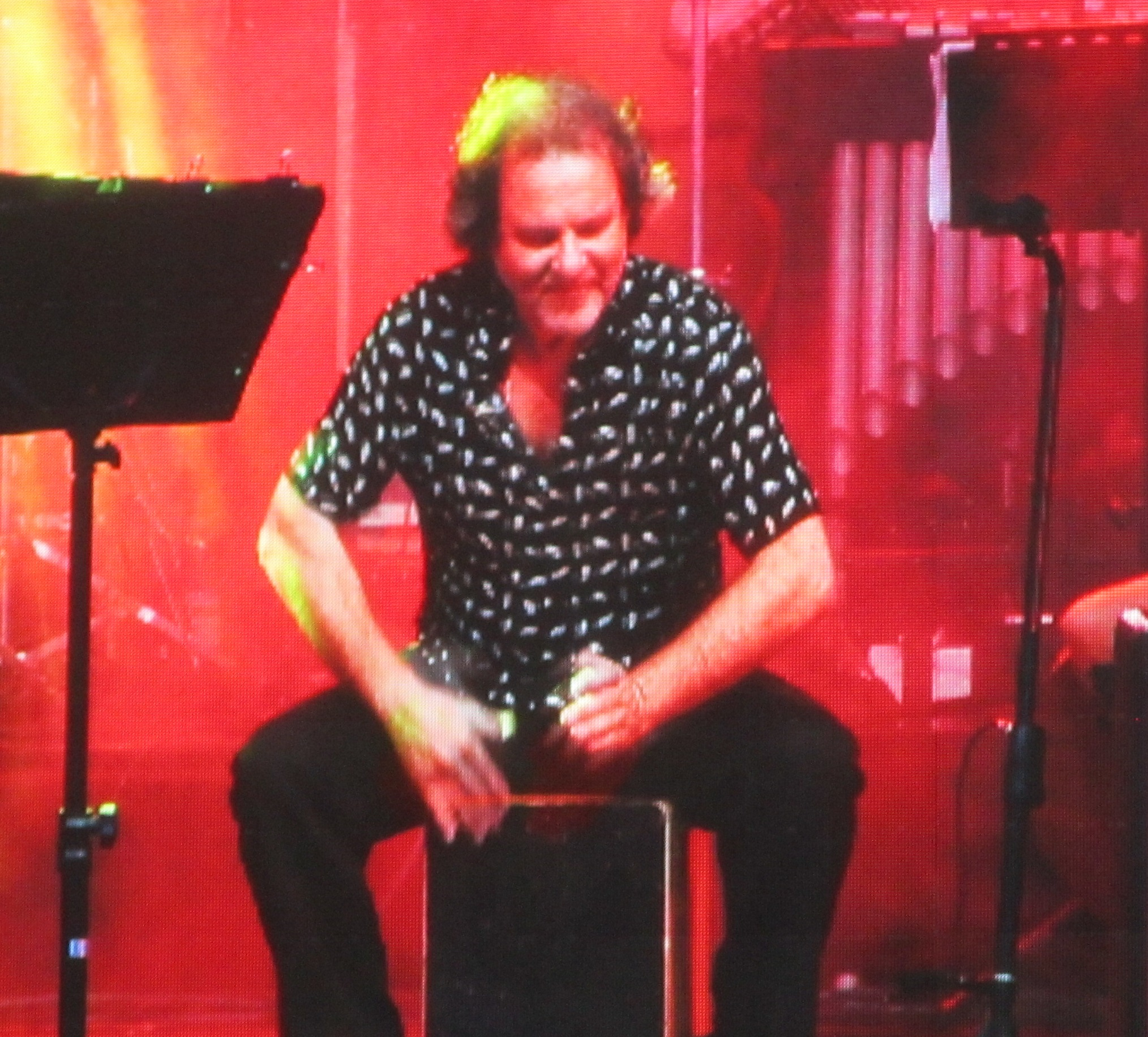 Congreso en el Rockodromo 2017